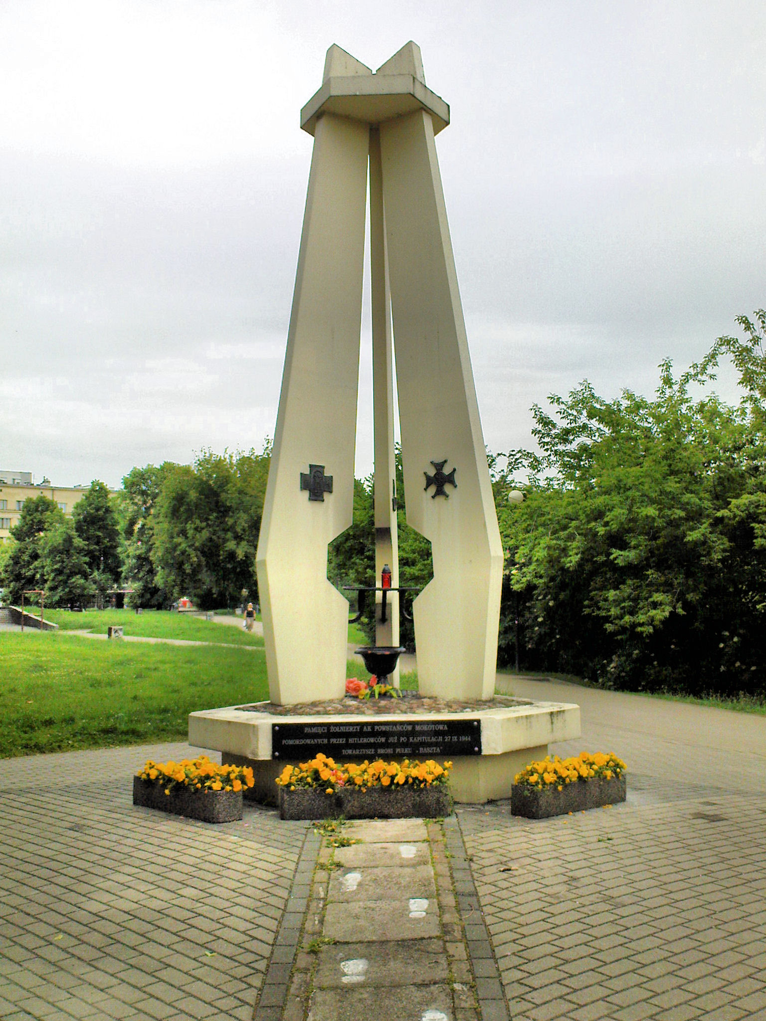 Pomnik Żołnierzy Armii Krajowej Pułku "Baszta" zamordowanych na Dworkowej